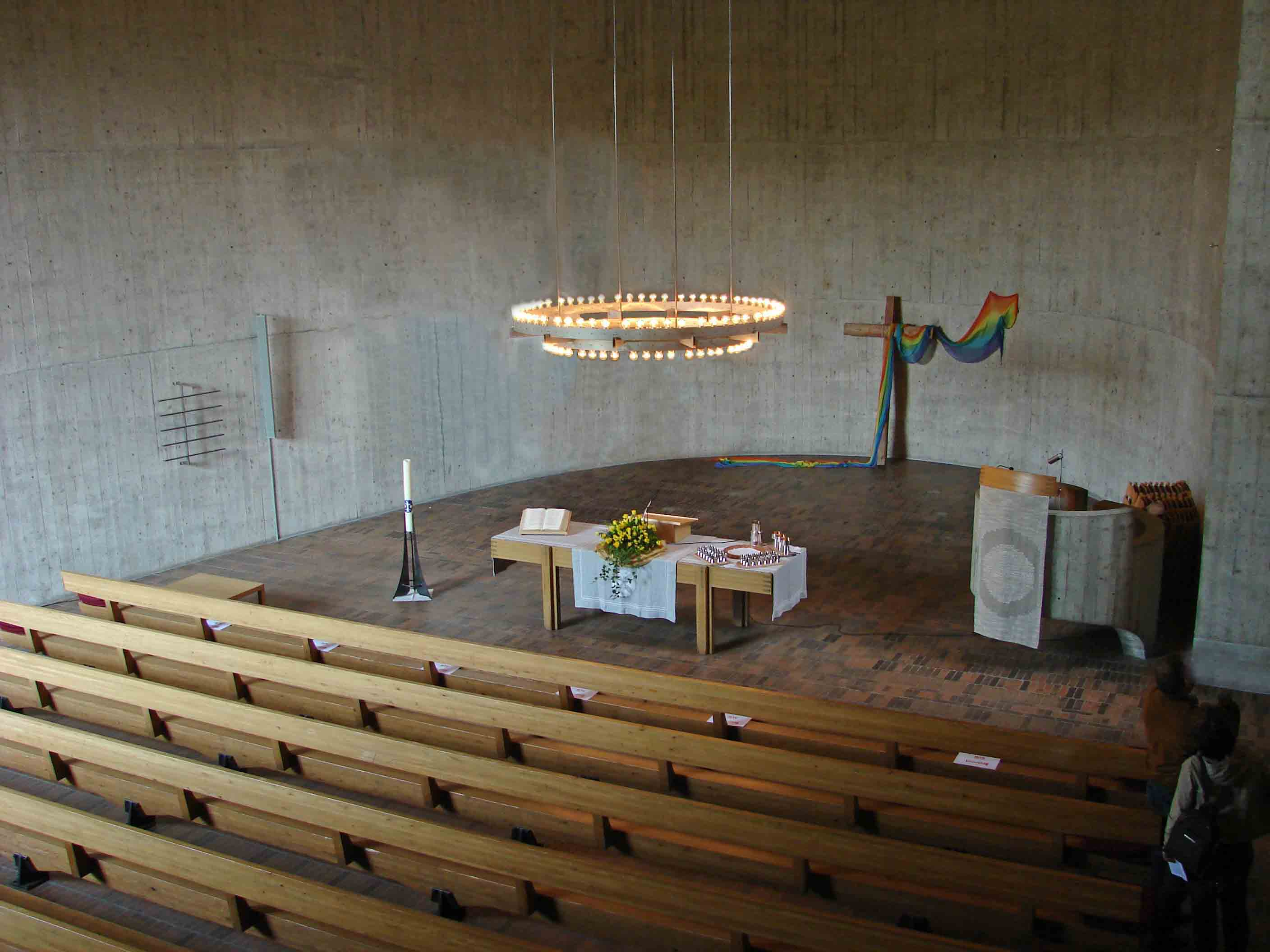 Kirchenschiff und Chorraum vor der Renovation